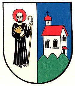 Blazon of St. Gallenkappel, Canton of St. Gallen - Blazono de Sankt-Gallenkappel, Kantono de Sankt-Galo